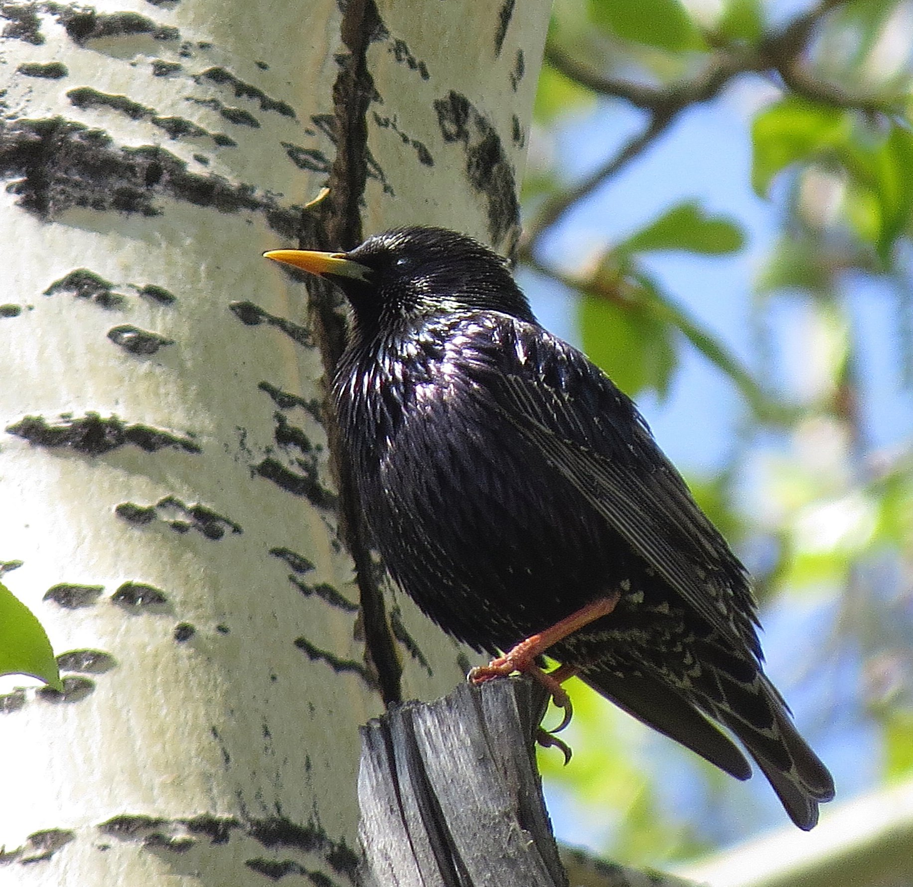 Black Starling in Eastern Siberia